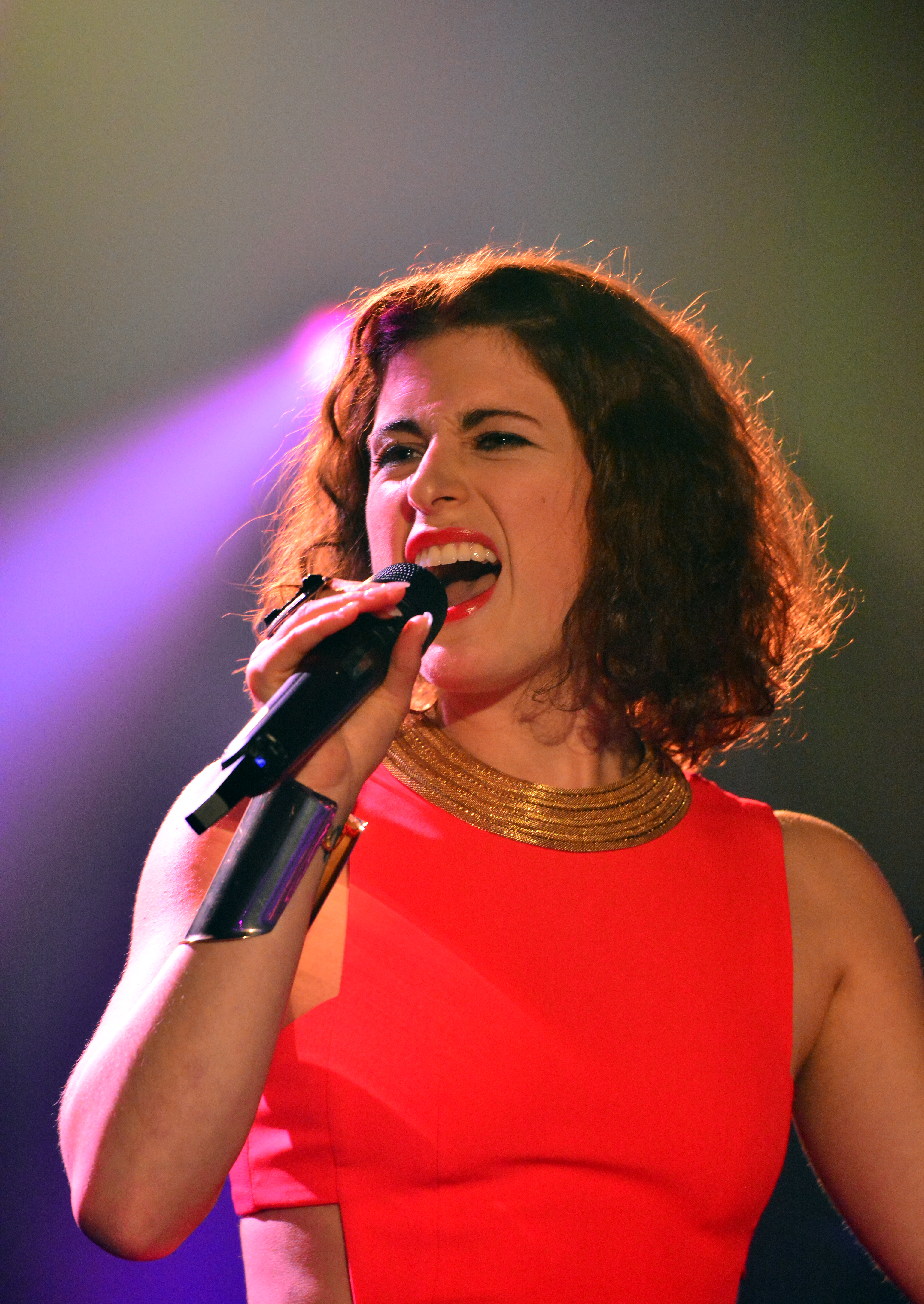 Ann Sophie beim 2. Probentag für das Clubkonzert - Unser Song für Österreich in der „Großen Freiheit 36“ in Hamburg